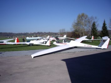 Flugzeugpark des LSV Schwabmünchen